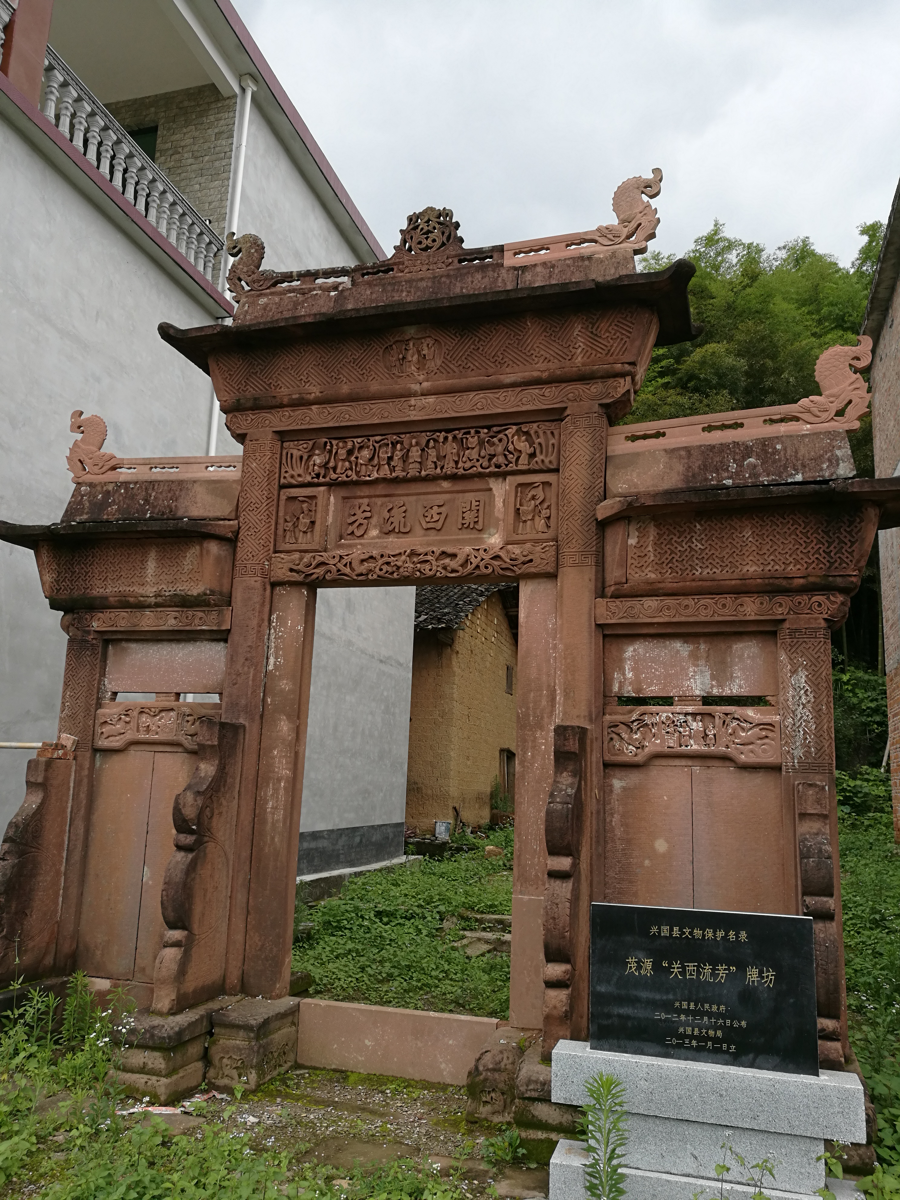 茂源“关西流芳”牌坊，位于江西省兴国县江背镇江背村茂源组，始建于清中叶。2018年被列为第六批江西省文物保护单位。牌坊正面。